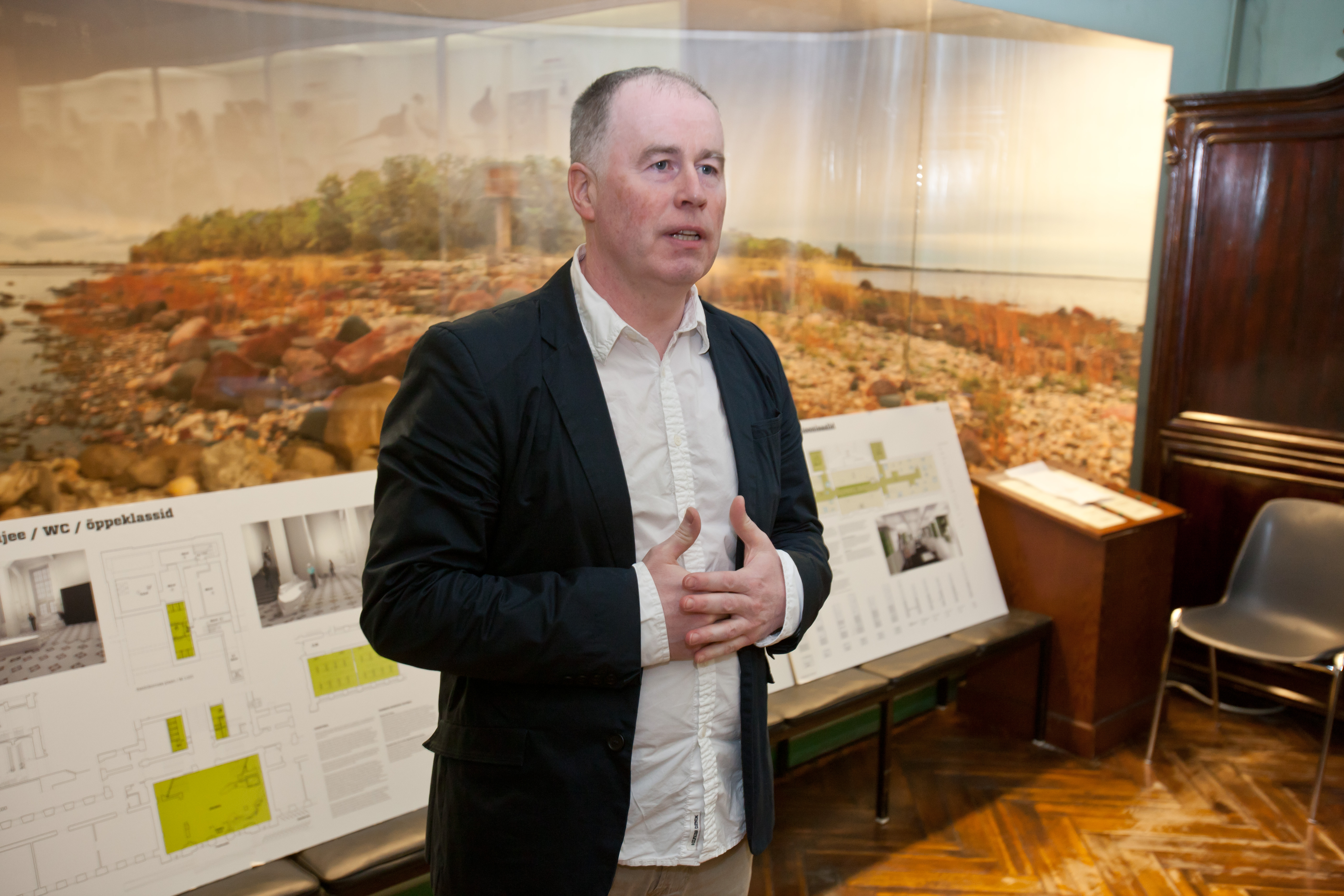 Tartu Ülikooli loodusmuuseumi direktor akadeemik Urmas Kõljalg 25. oktoobril 2011 Tartu Ülikooli loodusmuuseumi zooloogia saalis. Toimus loodusmuuseumi ekspositsiooni ja sisekujunduse uuendamiseks korraldatud ideekonkurssi võitjate nimekaartide avamine ja auhinnatute tunnustamine.